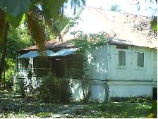 casa vieja vieja